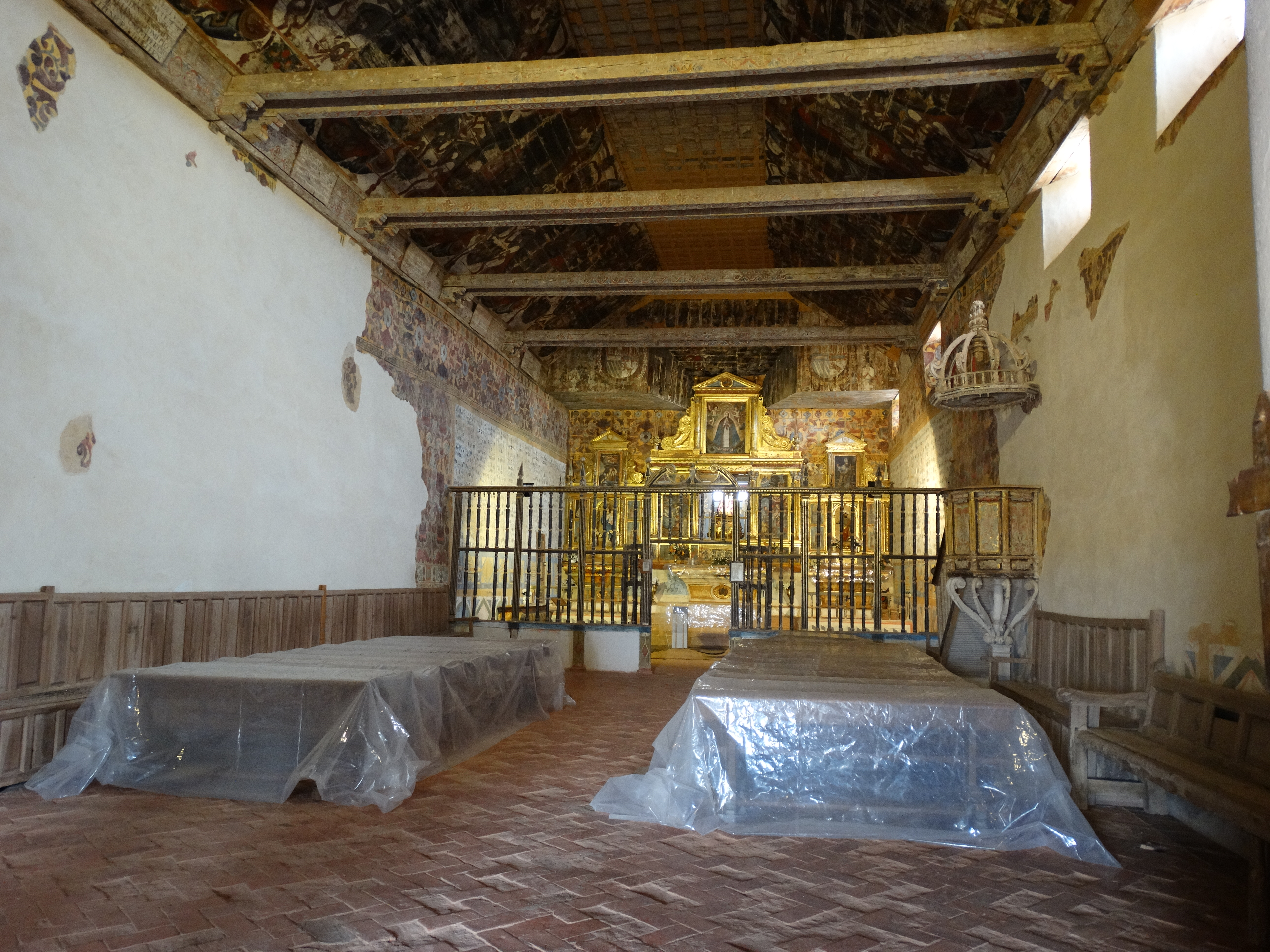 Pozuelo de la Orden, provincia de Valladolid, España. Ermita de Santa Ana, edificio con un artesonado mudéjar de gran valor y pinturas del siglo XVII recuperadas en la última restauración. Está catalogado como BIC. Interior de la iglesia con vistas del presbiterio; el pavimento es cerámica de Talavera del siglo XVII. (Los bancos están tapados, protegidos para evitar las cagarrutas de los murciélagos que tienen sus nidos arriba).